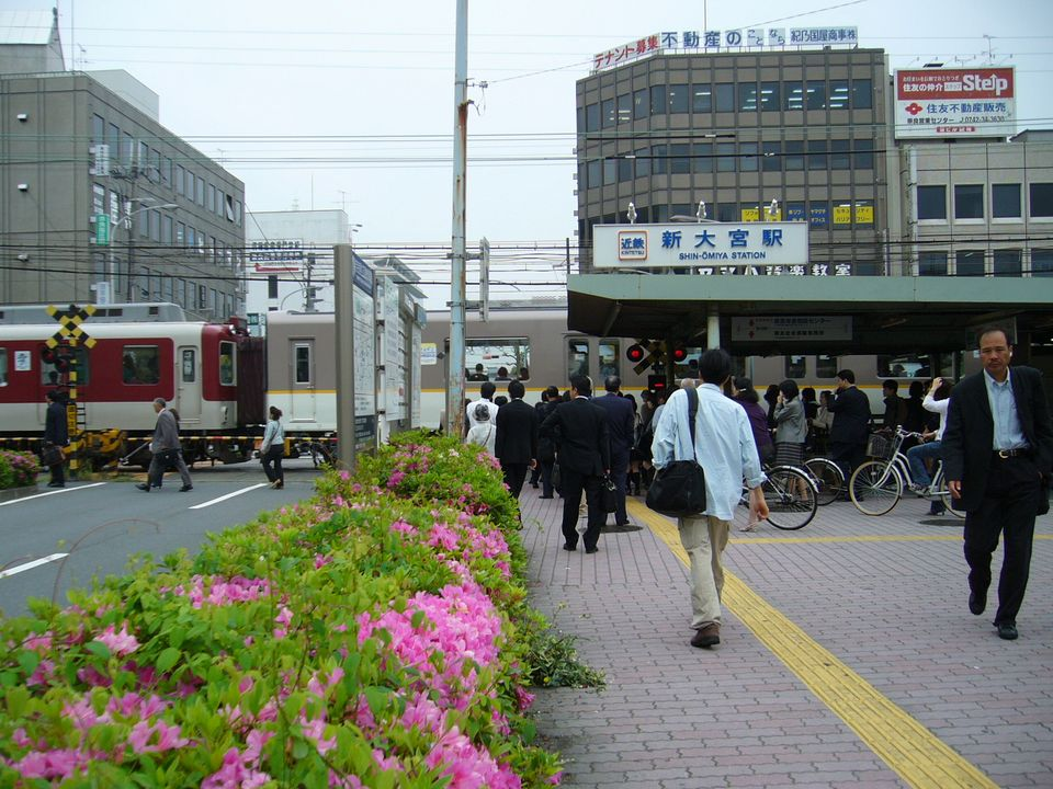 朝の新大宮駅北口（近鉄奈良線）